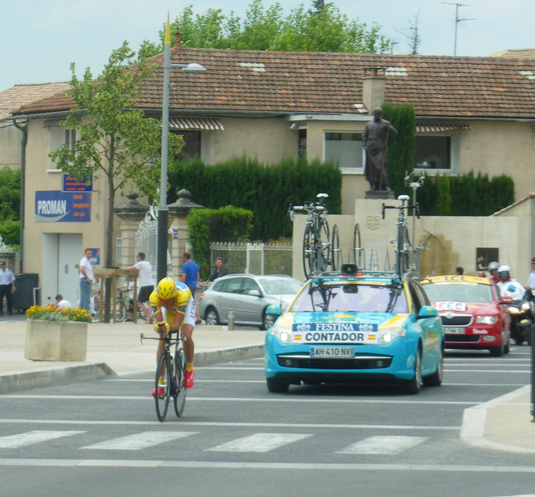 Alberto Contador lors de la 3ème étape du Dauphiné Libéré 2010 (Monteux - Sorgues)